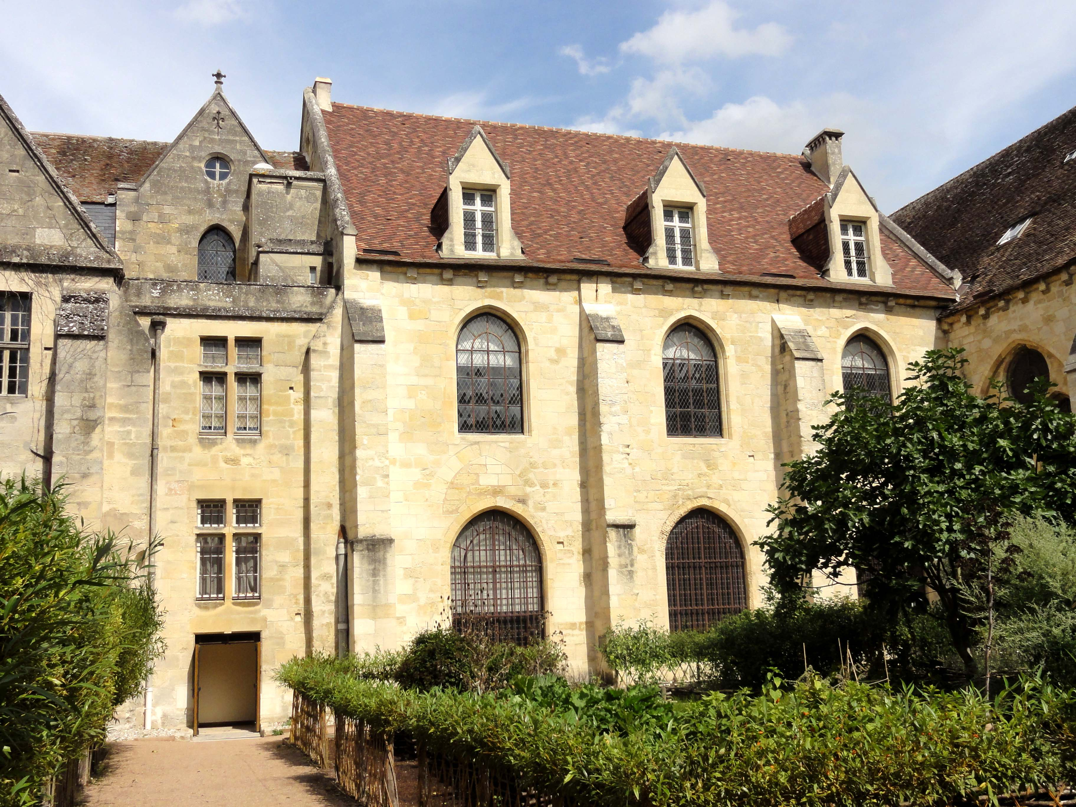 Abbaye de Royaumont - voir titre.